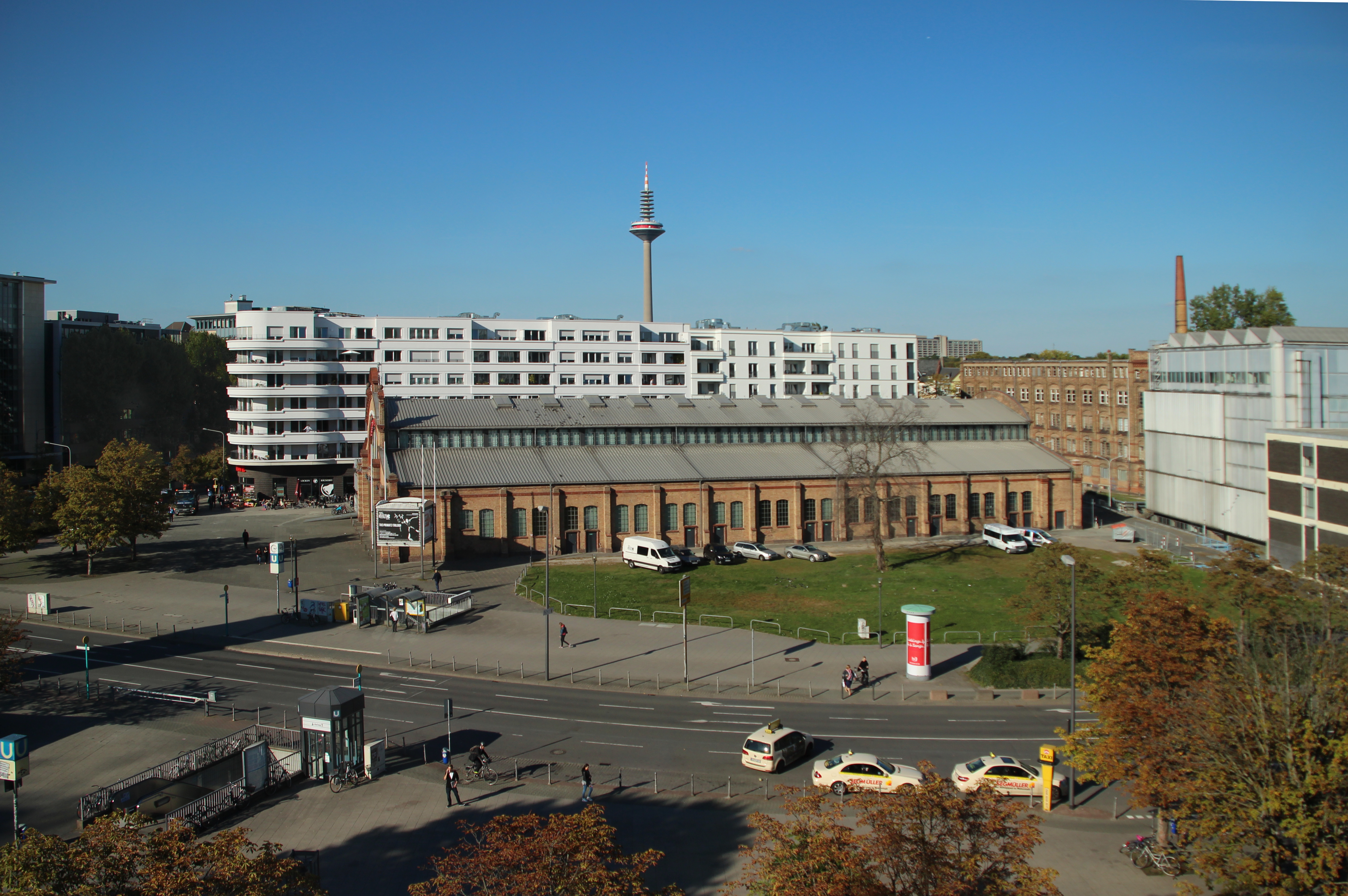 Bildinhalt: Blick über die Bockenheimer Landstraße mit U-Bahn-Station auf das Bockenheimer Depot, links vor dem Eingang des Depots der Carlo-Schmid-Platz, dahinter - in weiß - der Gebäudekomplex "Wohnen am Depot" im Gabriel-Riesser-Weg, rechts im Hintergrund die alte Druckerei Dondorf mit Schornstein, ganz rechts die Uni-Bibliothek. In der Mitte, ganz im Hintergrund der Ginnheimer Spargel. Aufnahmeort: Frankfurt am Main, Deutschland